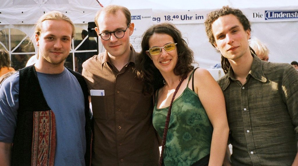 "Lindenstraße" Cast - Moritz A. Sachs, Philipp Neubauer, Clelia Sarto, Moritz Zielke in Rostock 1998